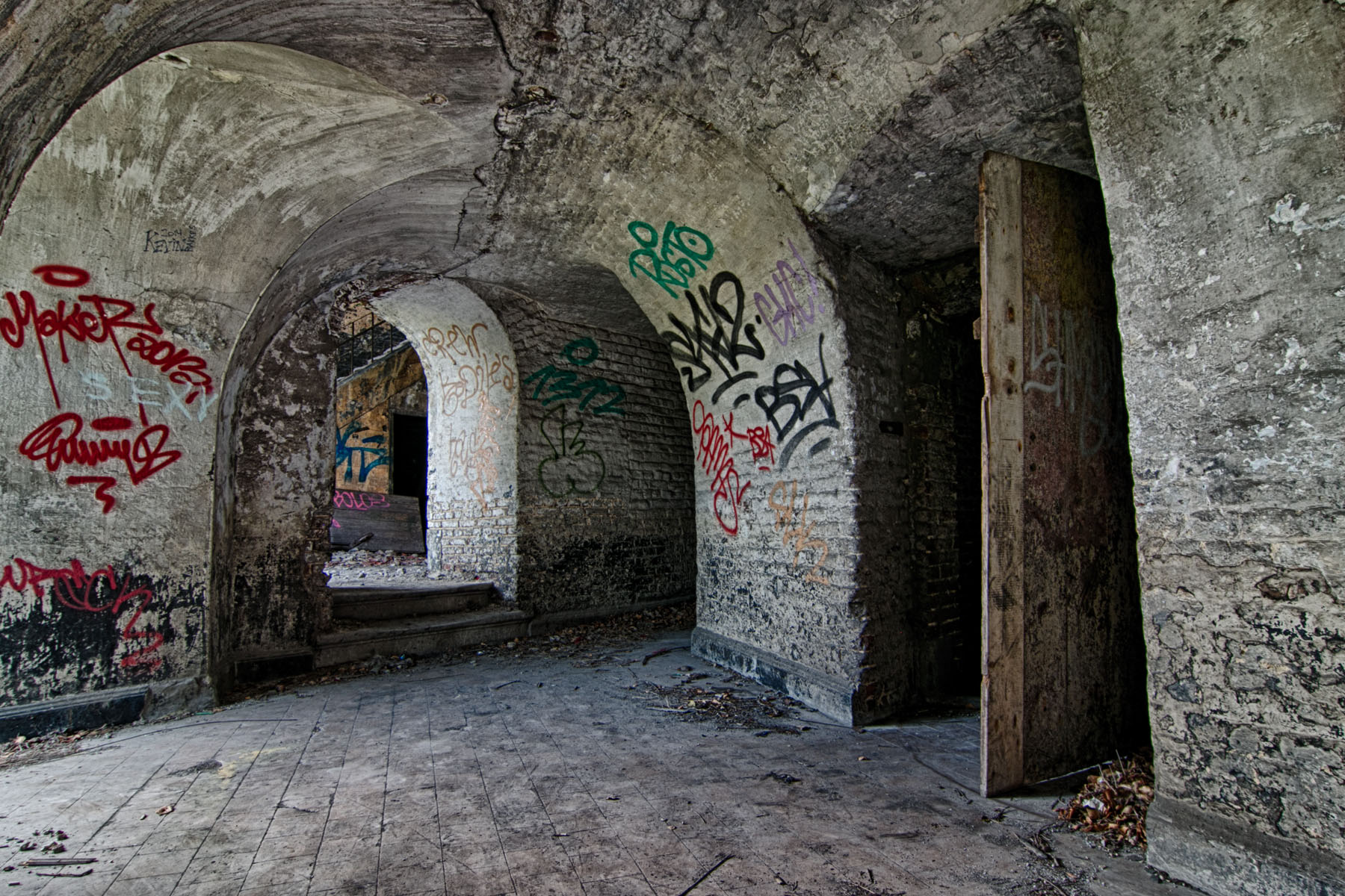 De gangen van Fort de la Chartreuse